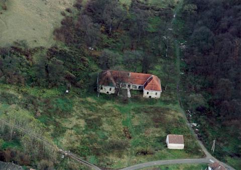 Karancsság, Hungary, aerialphotography